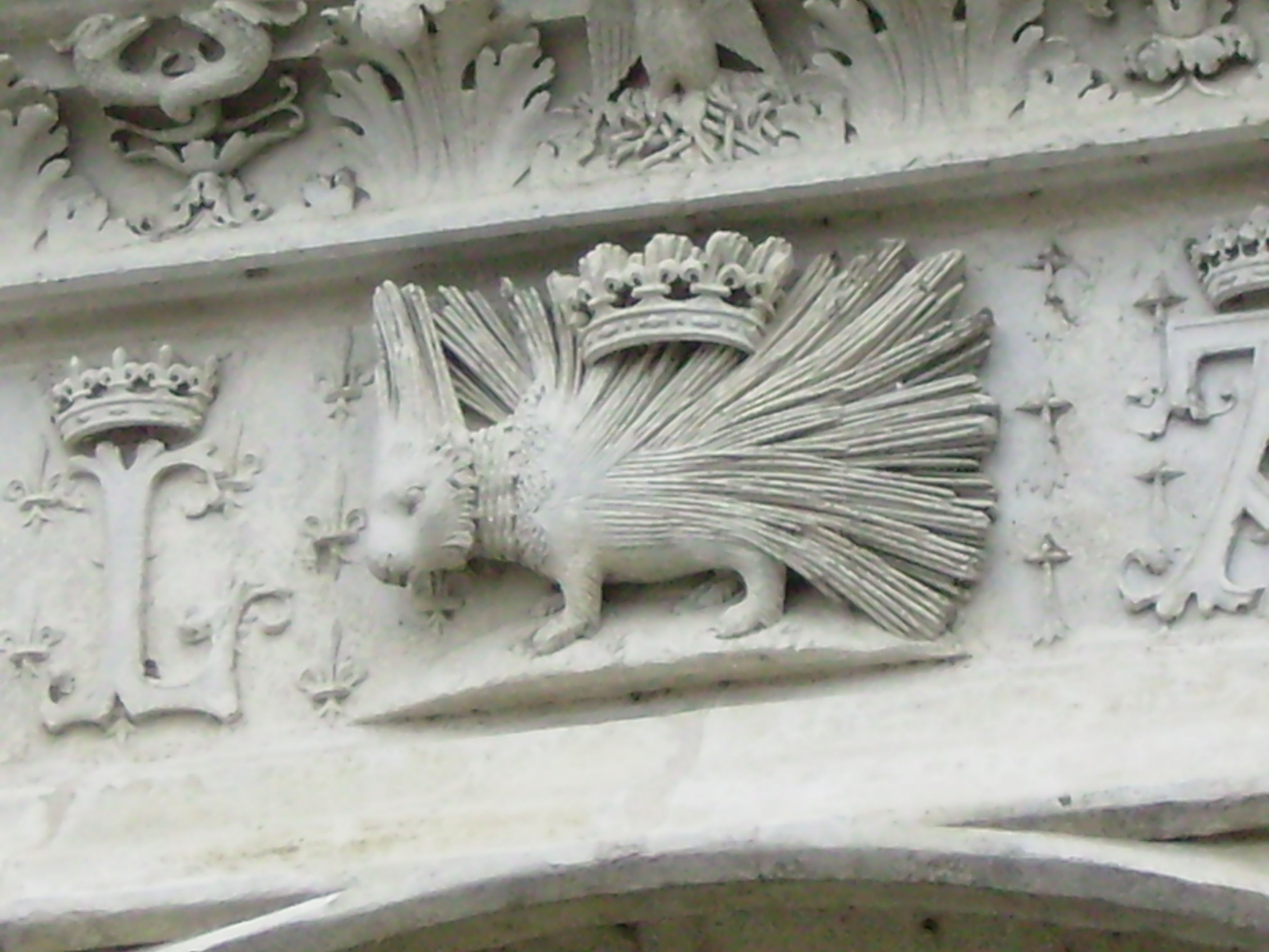 Wappentier Ludwigs XII über Renaissanceportal Schloss Blois